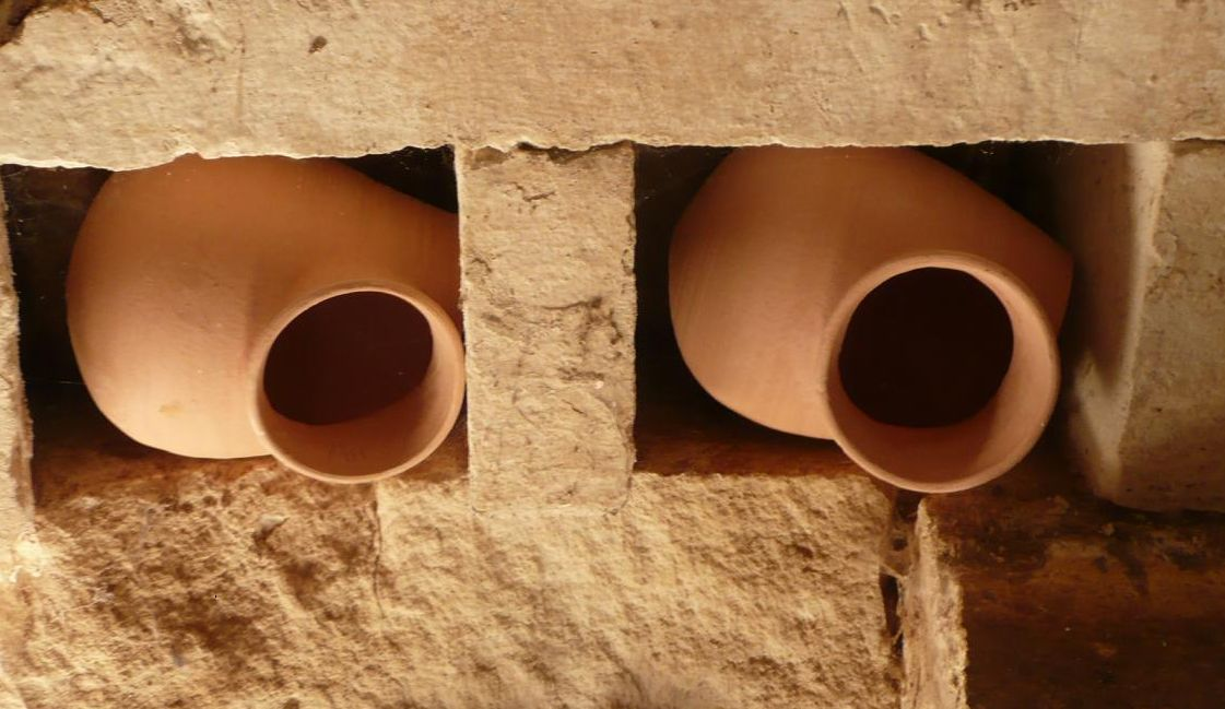 Boulins en place